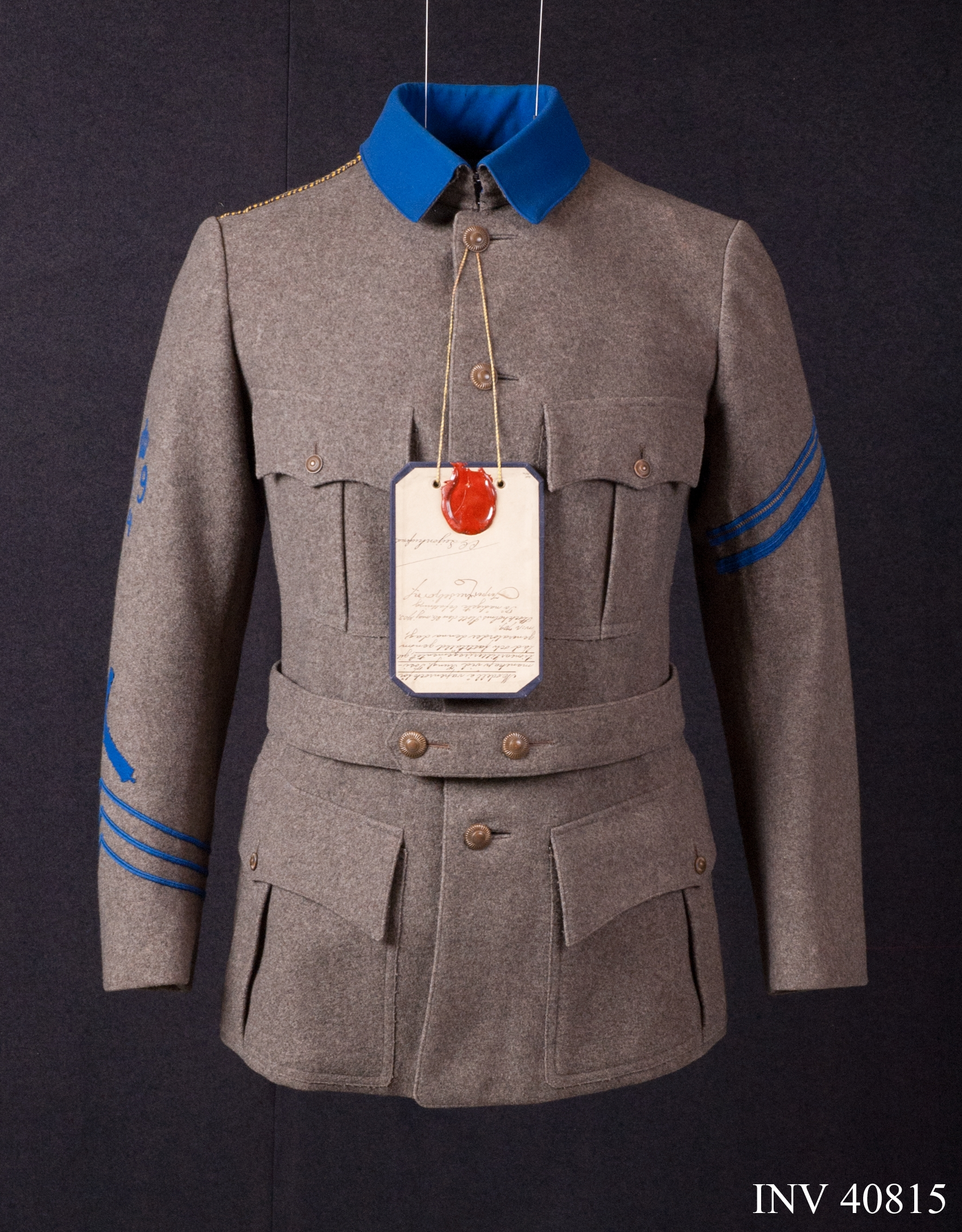 Vapenrock m/1903 Identifikationsnr: AM.040815 Samling: Armémuseum